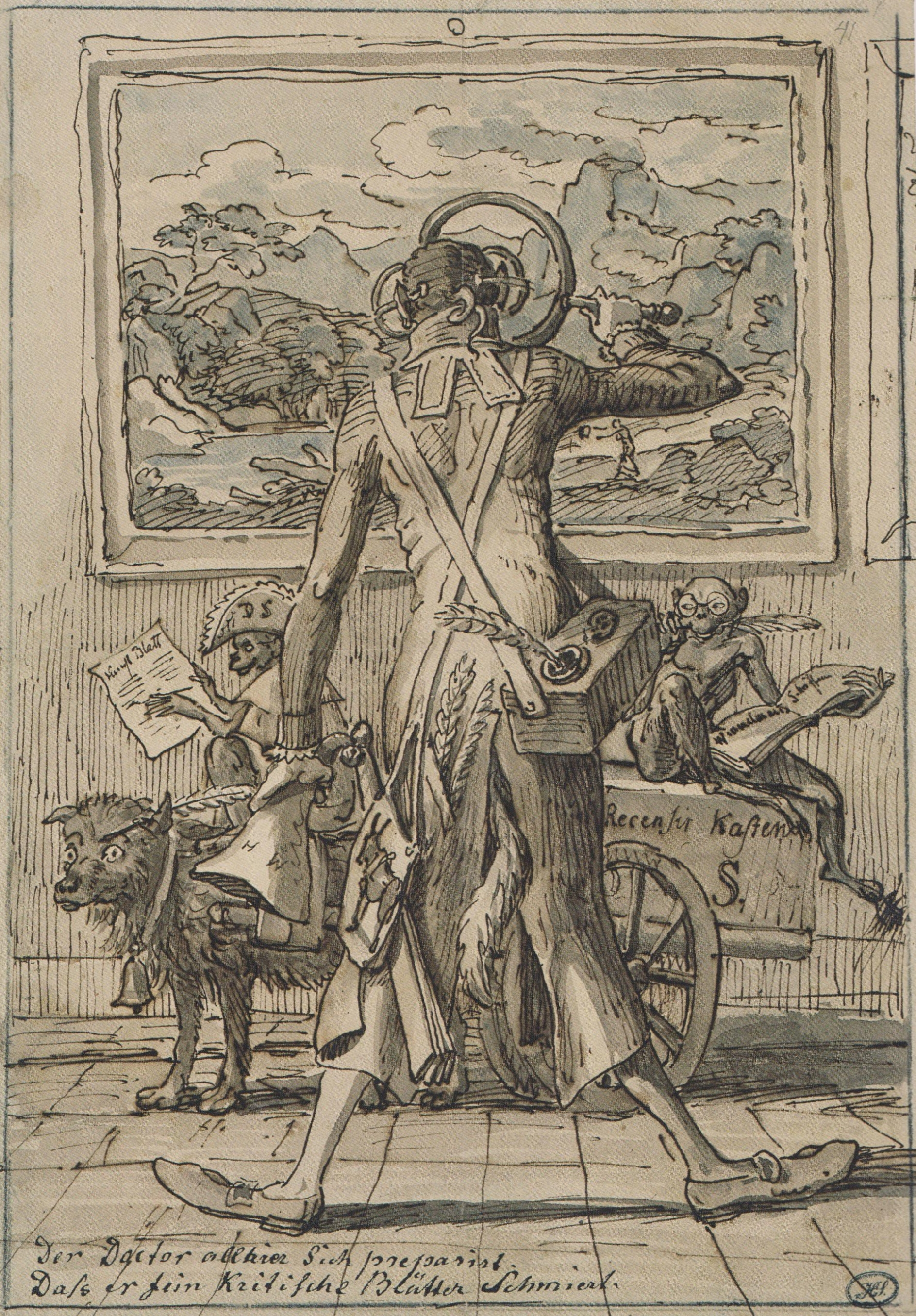 Karikatur auf Dr. Ludwig Schorn in München. Feder in Braun, grau und graublau laviert, 1829/33. 28,8 x 20,4 cm. Staatliche Museen Berlin, Kupferstichkabinett